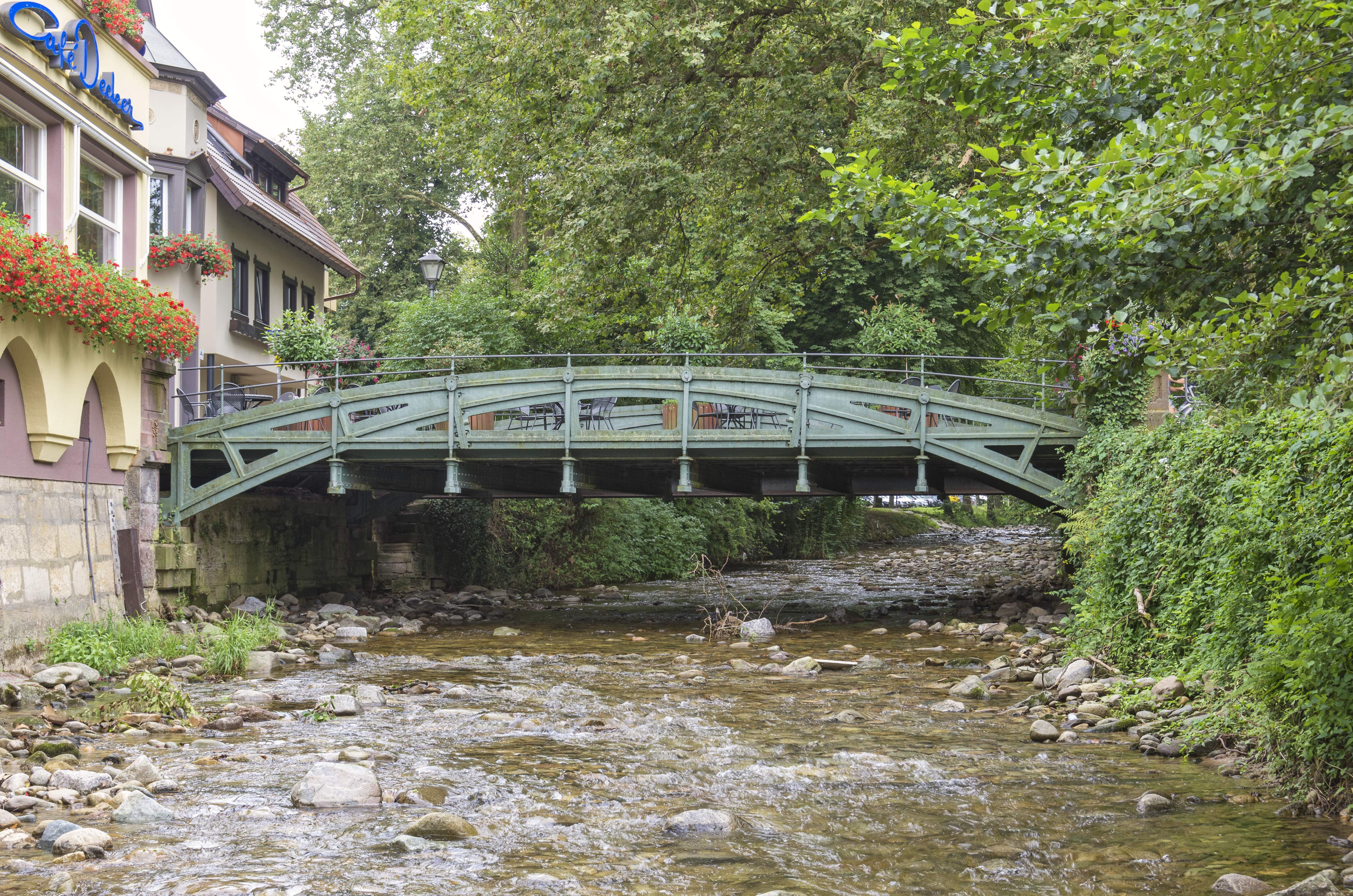 Bilder aus Staufen